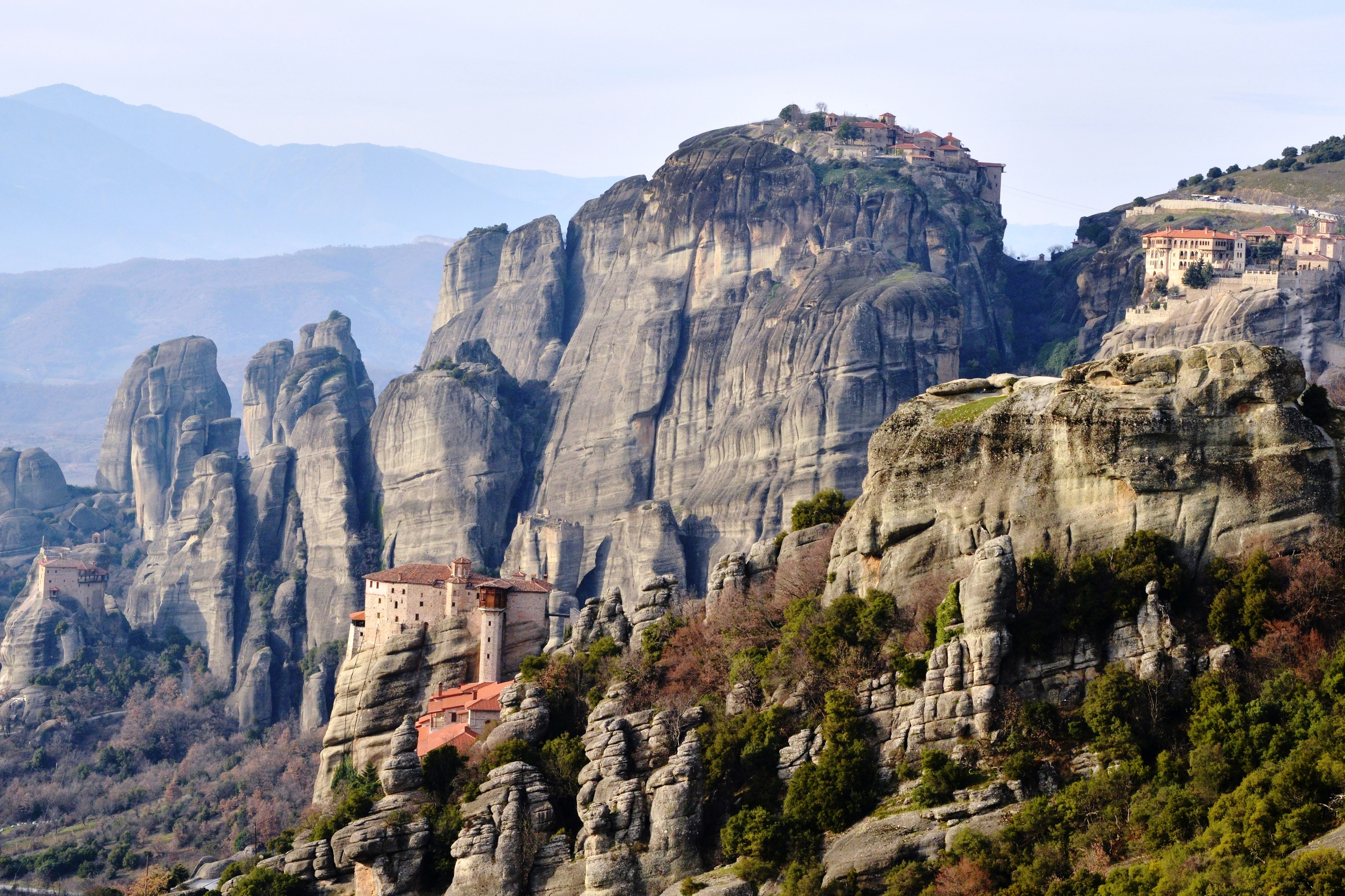 Μετέωρα«Μεταλλευτικό Συγκρότημα Καμάριζας Λαυρίου»